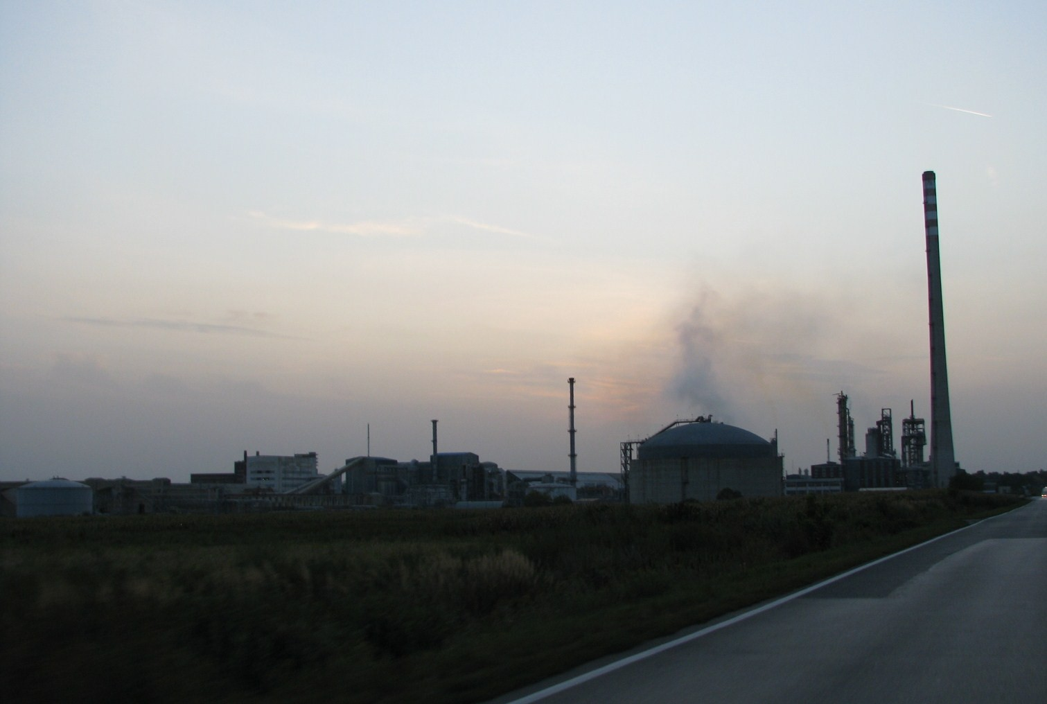 Pogon Petrokemije u Kutini